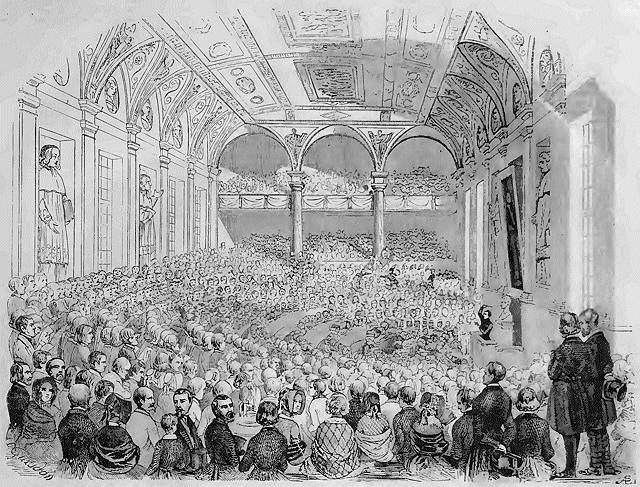 Séance générale de l'Orphéon dans la grande salle de la Sorbonne à Paris, sous la direction de Joseph Hubert, successeur de Wilhem à la tête de l'Orphéon.